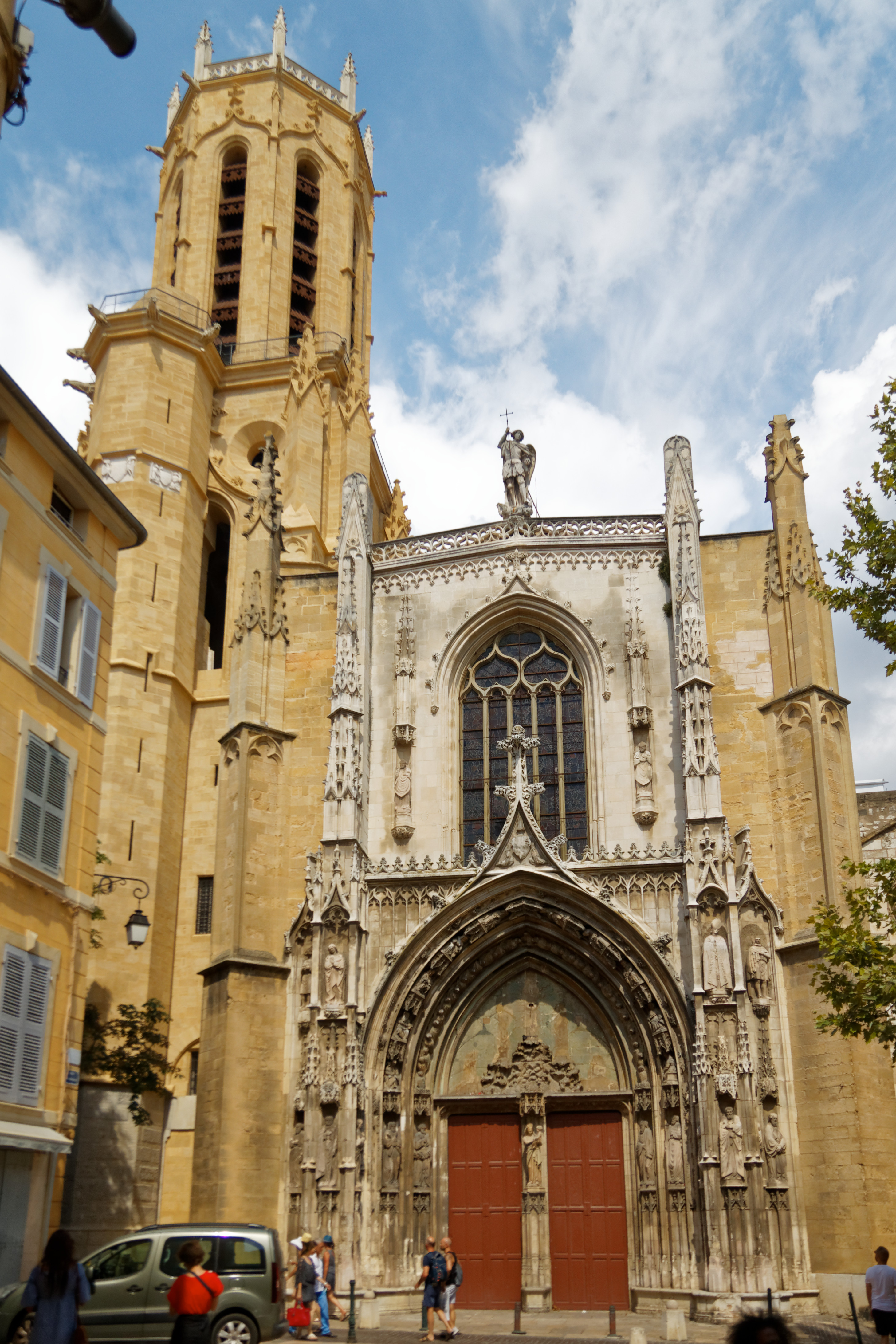 Kathedrale Saint-Sauveur in Aix-en-Provence, Westfassade des Mittelschiffs